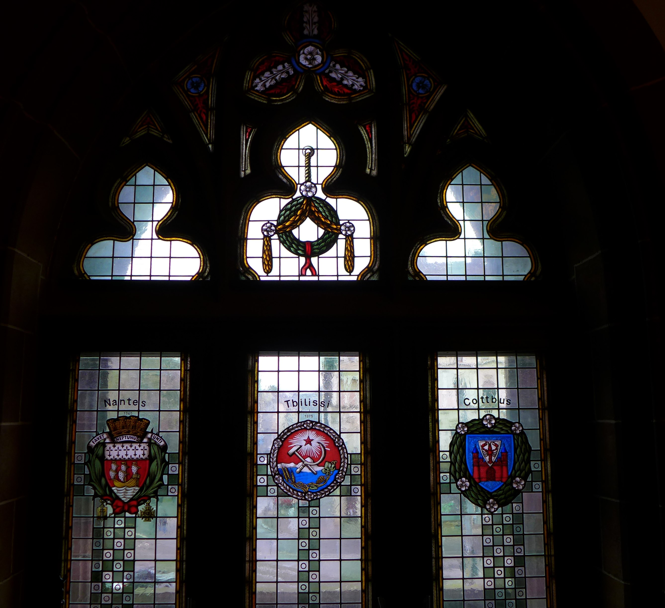 Rathaus St. Johann, Festsaal, Wappenfenster der Partnerstädte Nantes, Tblissi, Cottbus